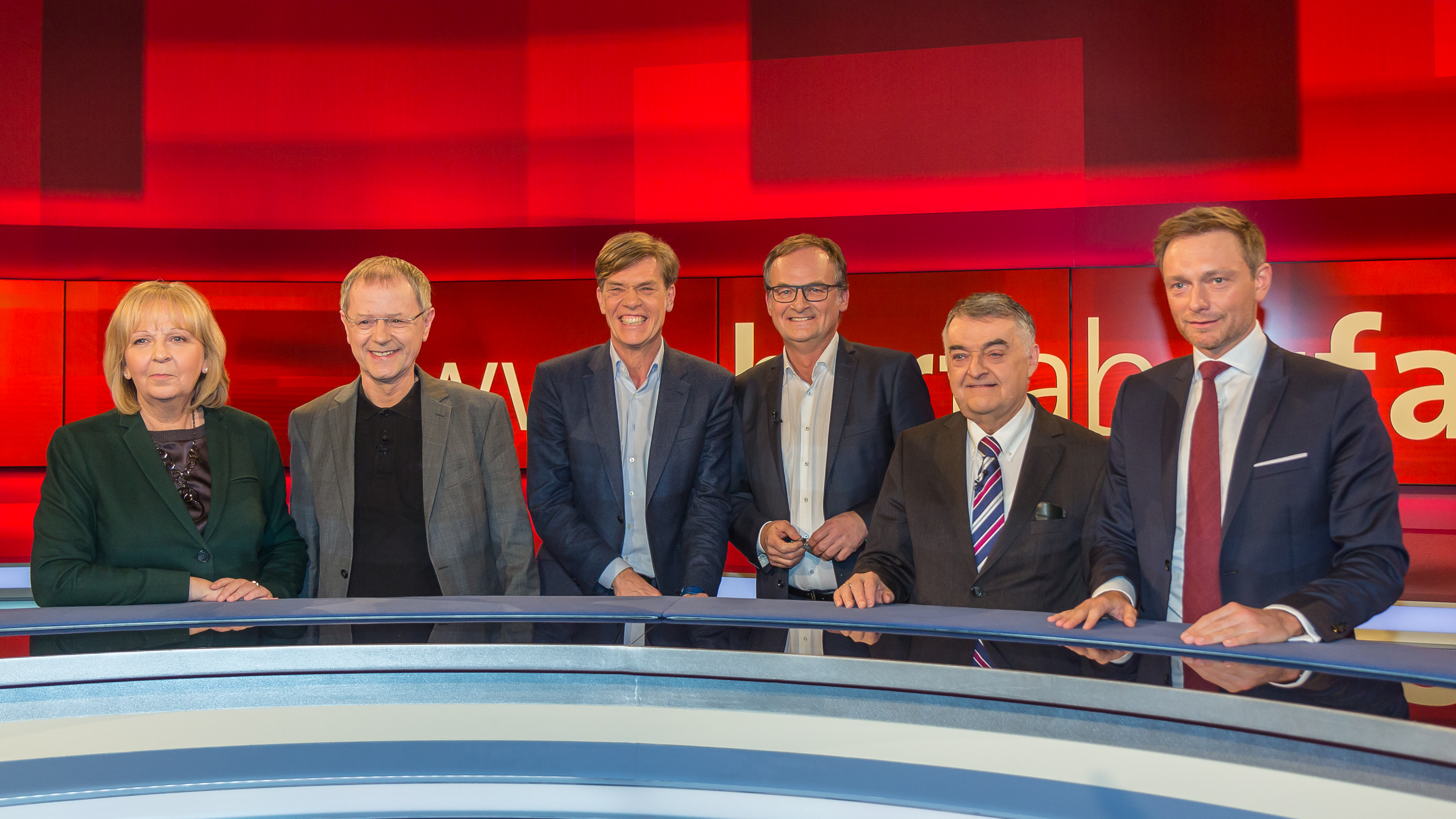 Pressetermin nach der Livesendung „Hart aber Fair“ am 20. Februar 2017. Thema der Sendung: „Der Alternative – wie gefährlich wird Schulz für Merkel?“ Gruppenfoto: Hannelore Kraft (SPD, NRW-Ministerpräsidentin, stellvertretende Parteivorsitzende), Christoph Butterwegge (Politikwissenschaftler und Armutsforscher), Hajo Schumacher (Journalist und Moderator), Frank Plasberg (Moderator der Sendung), Herbert Reul (CDU, Vorsitzender der CDU/CSU-Gruppe im Europäischen Parlament), Christian Lindner (FDP, Bundesvorsitzender; NRW-Landesvorsitzender)